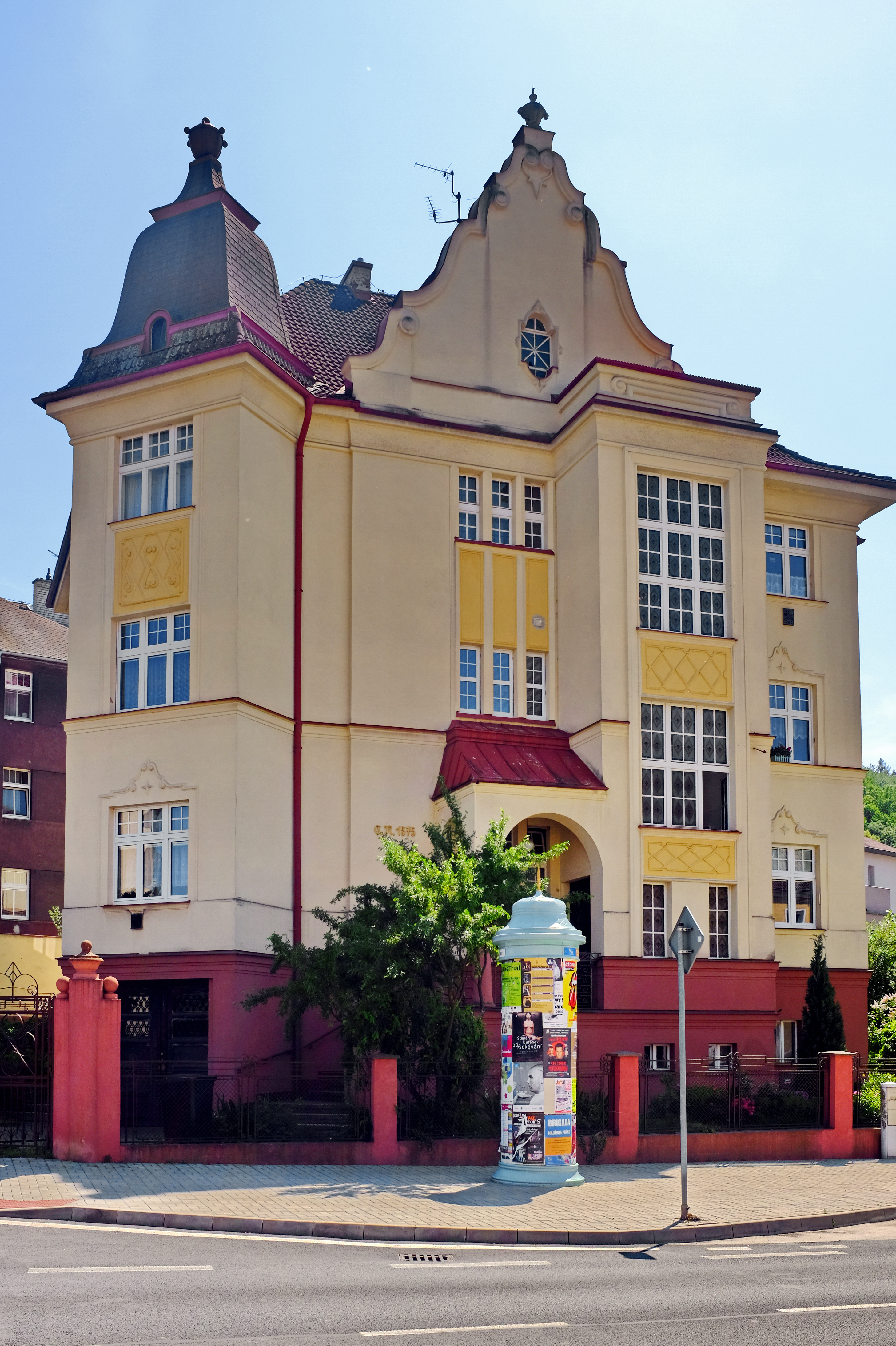 Karlovy Vary, místní čtvrť (ZSJ) Tuhnice, Moskevská ulice vila Nürburg